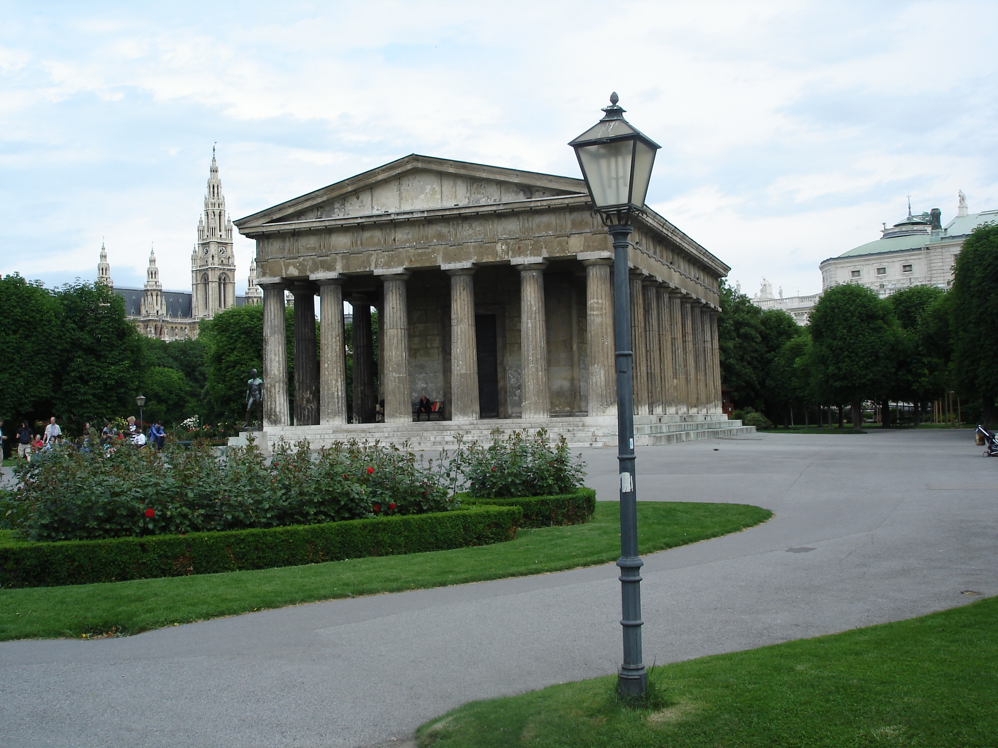 Volksgarten. Wien. Österreich.